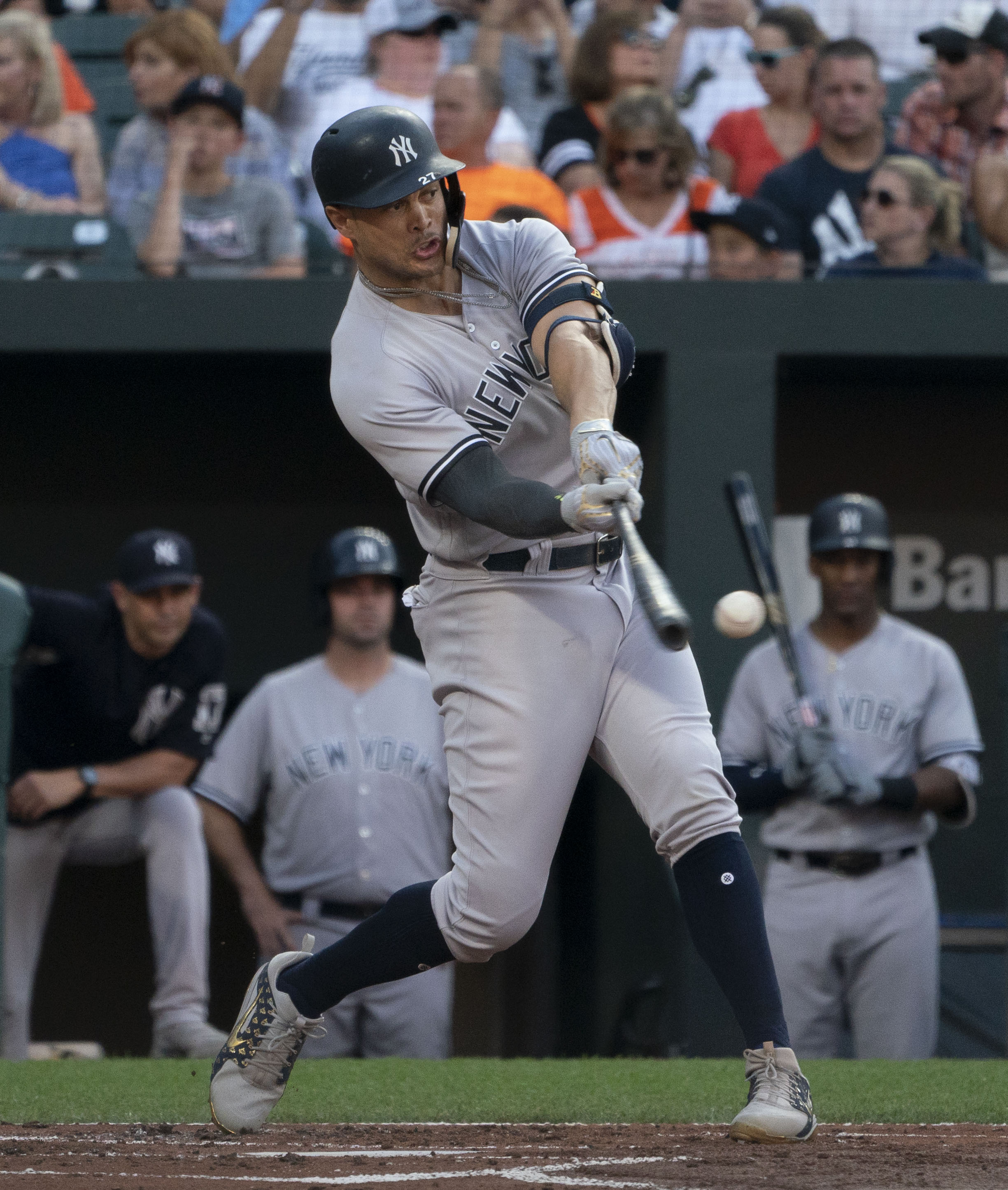 Yankees at Orioles 7/10/18